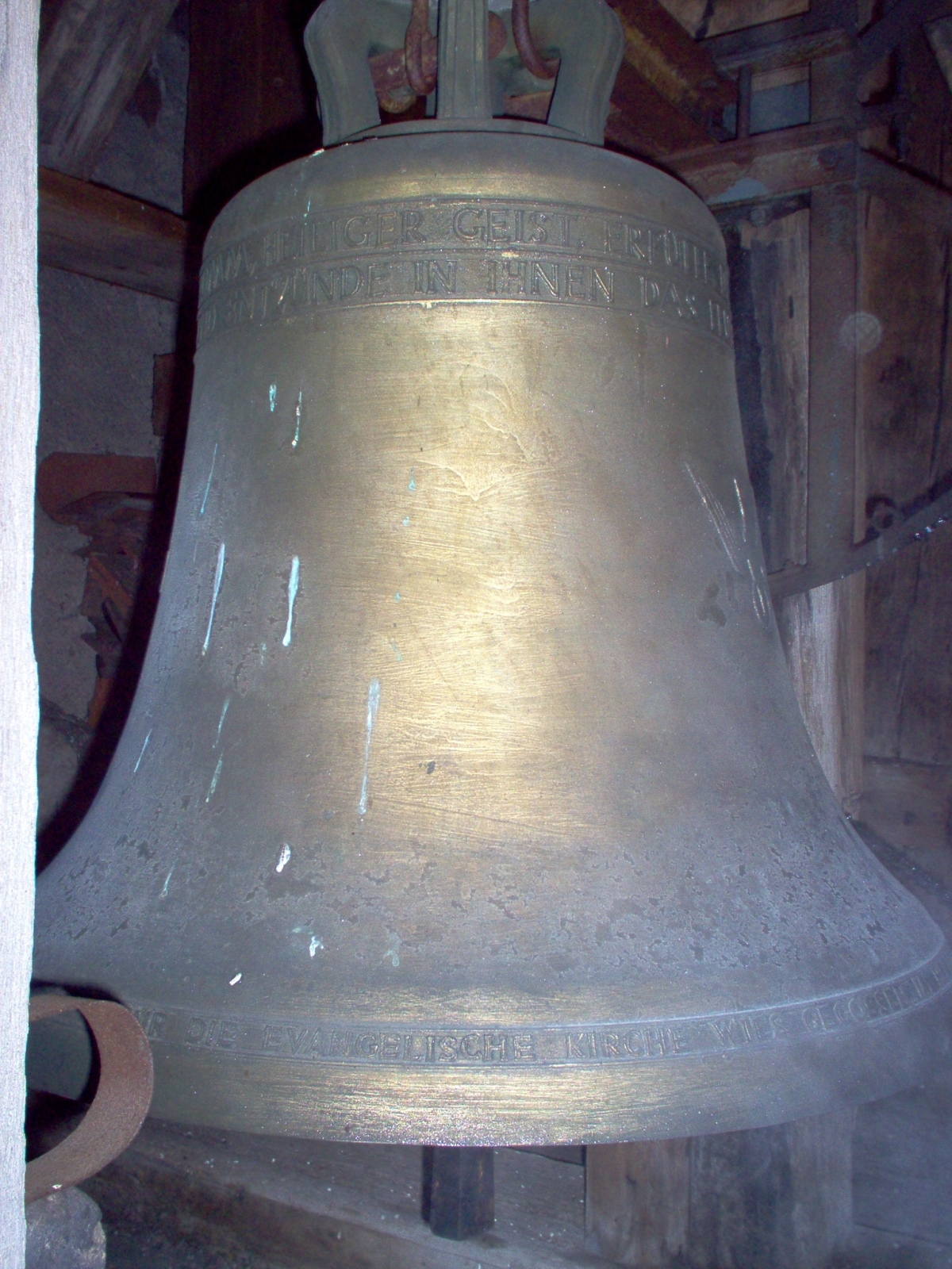 church bell in Wies, Germany